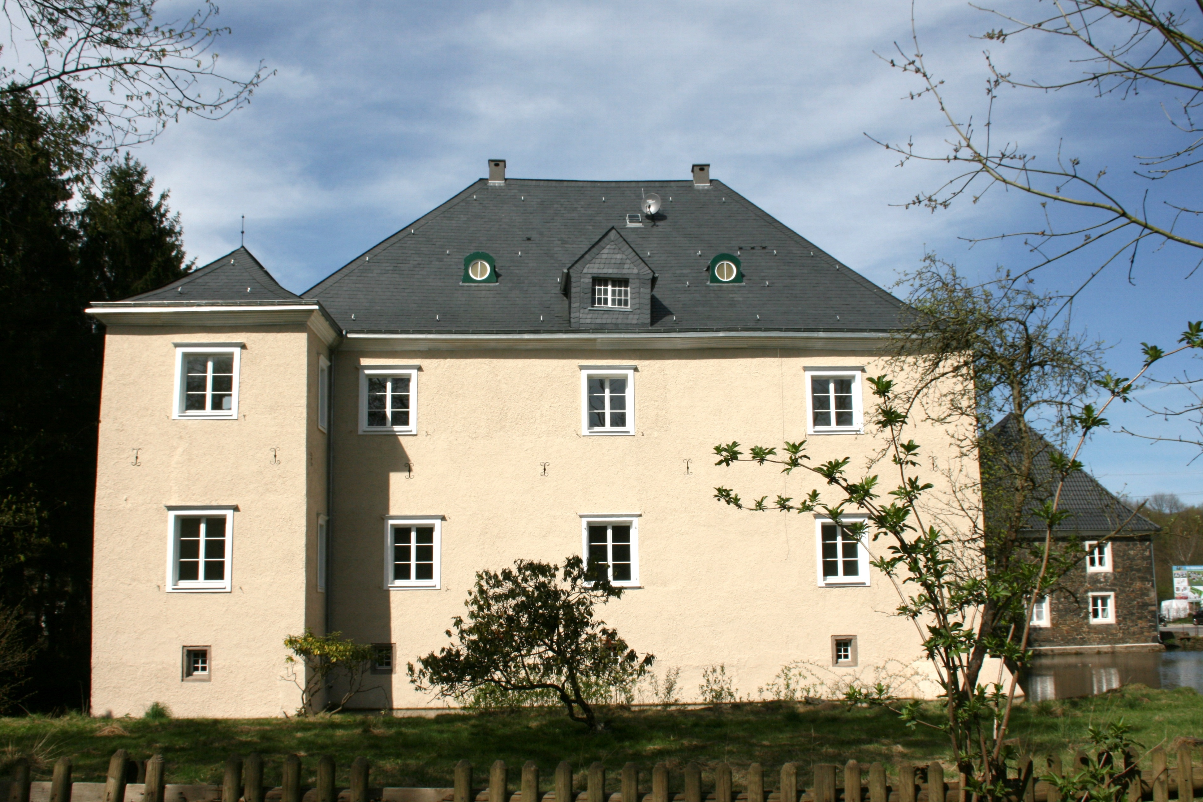 Gut Rocholz an der Rocholzallee in Gevelsberg